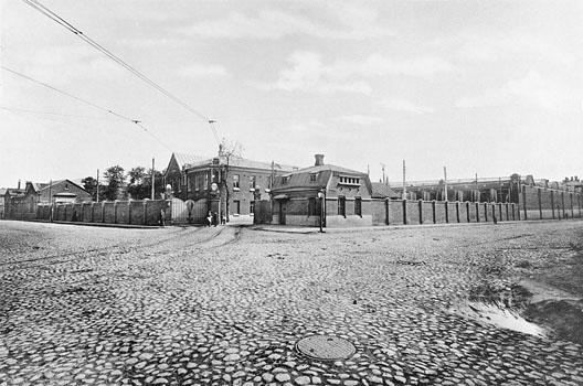 162. Рязанскiй паркъ городскихъ желЪзныхъ дорогъ на Ольховской ул. (Москва - 2й троллейбусный парк - угол Новорязанской и Ольховского тупика)